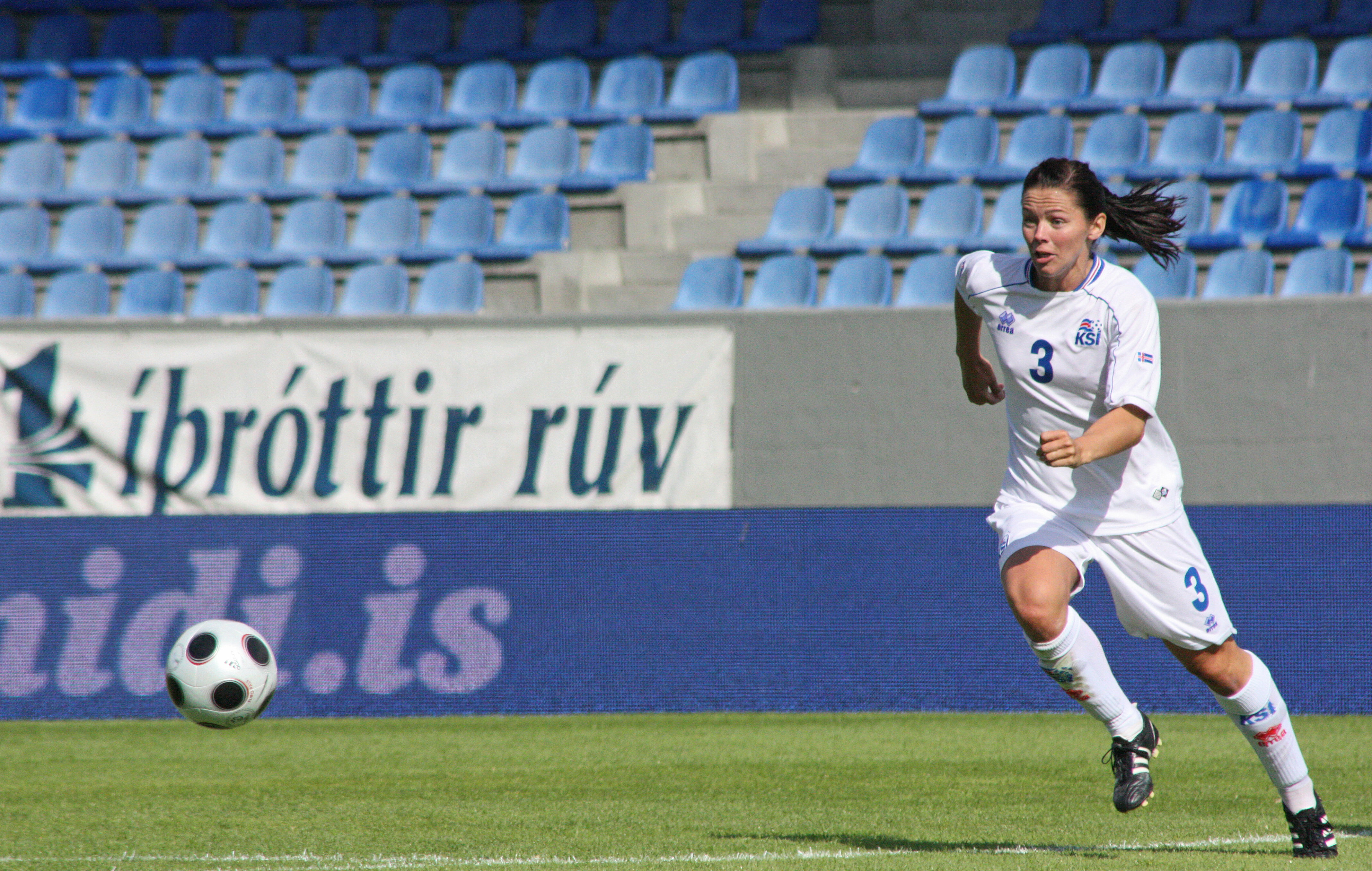 Ólína Guðbjörg Viðarsdóttir